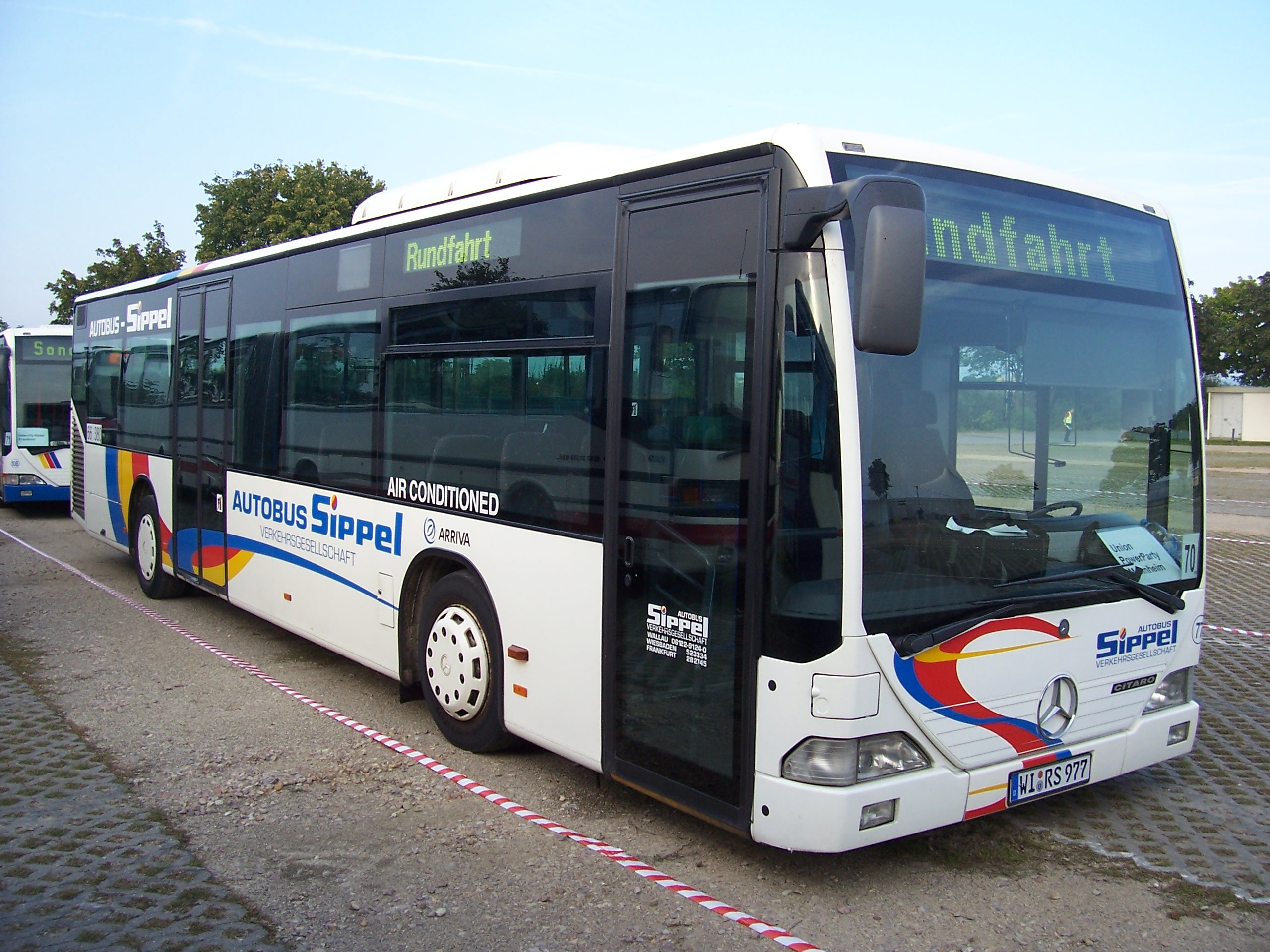 Ein Mercedes-Benz Citaro von Autobus Sippel anläßlich einer Veranstaltung/Sonderfahrt in Mannheim